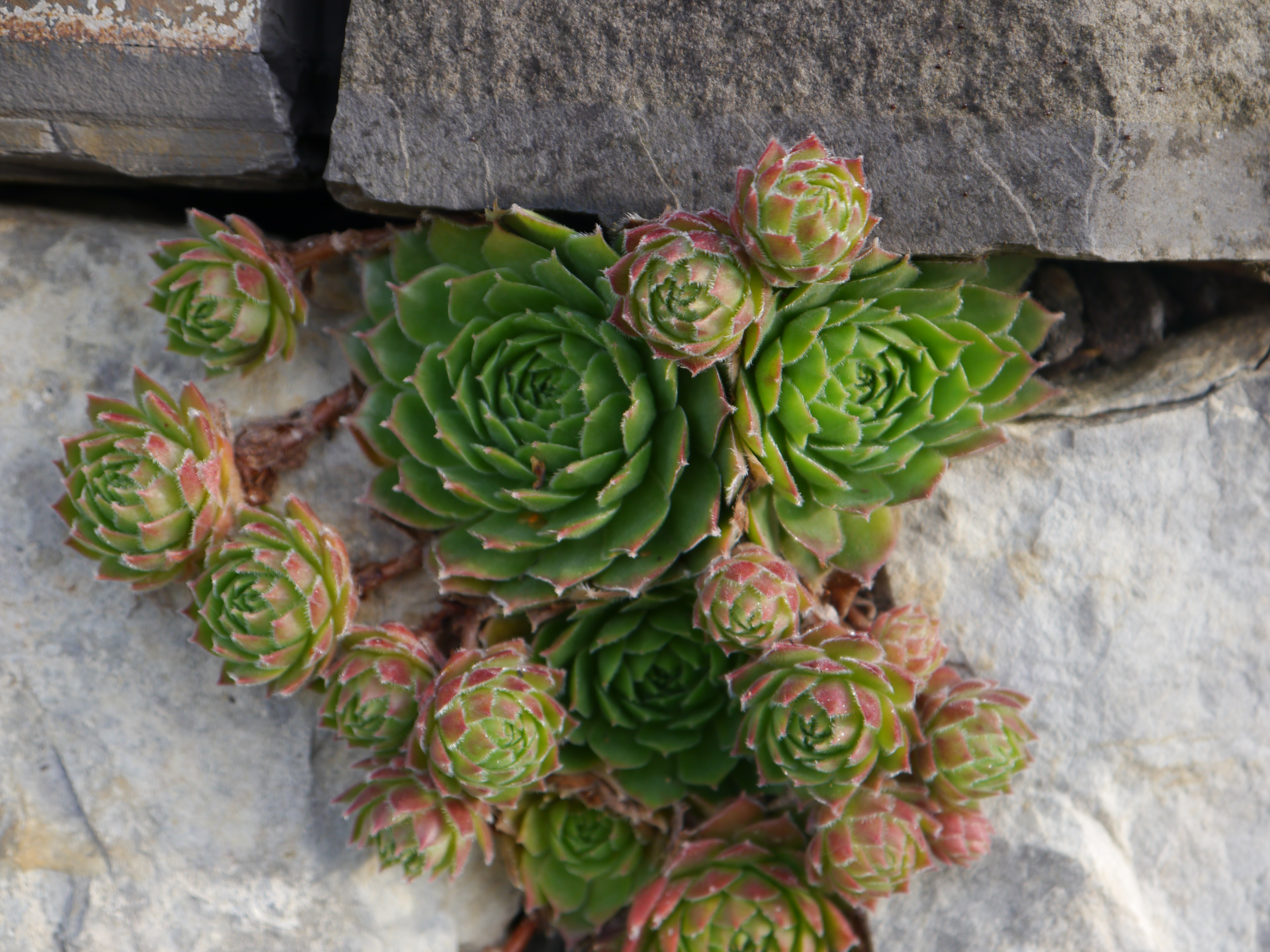 Hauswurz- Sorte Silverine entstanden 1961